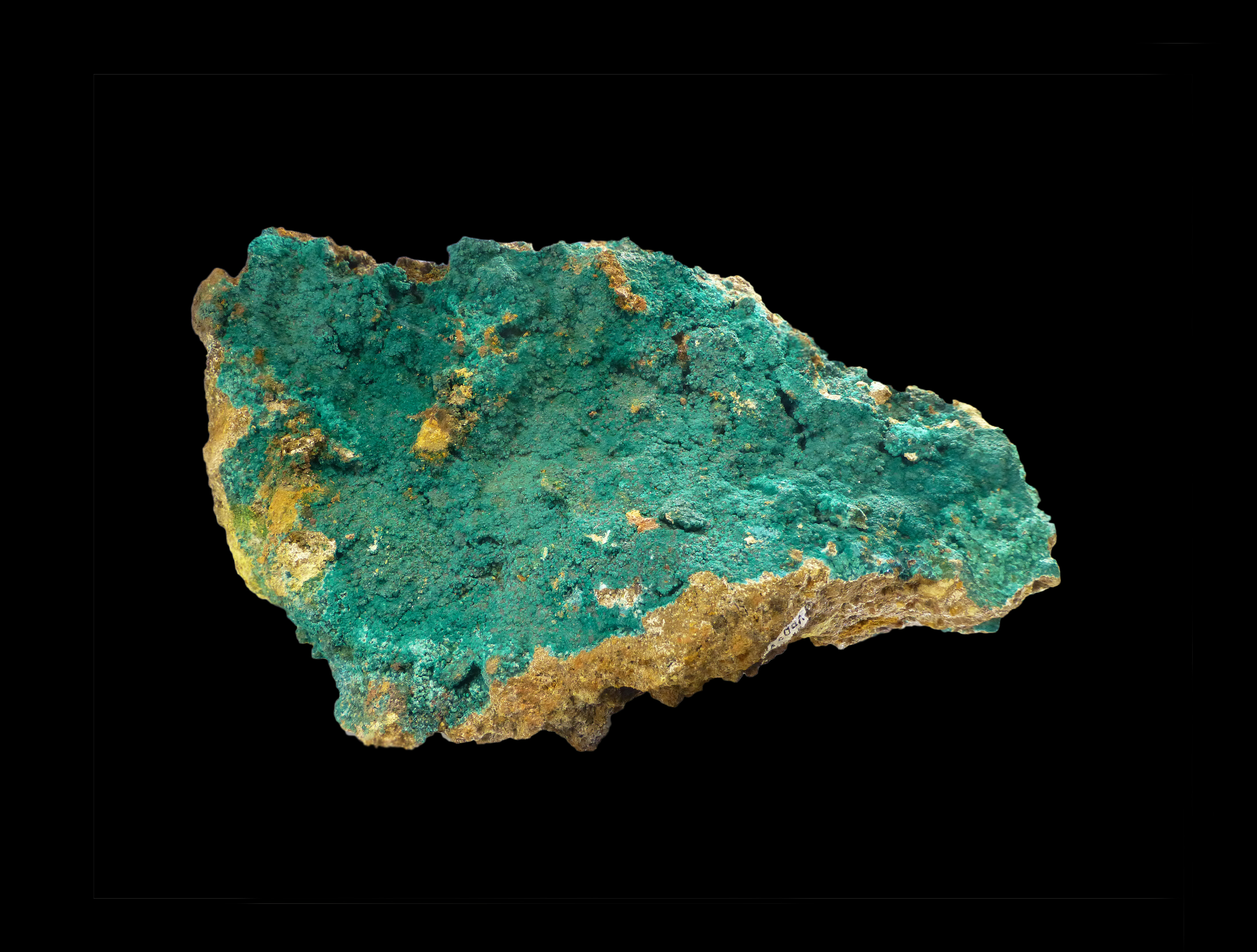 Reichenbachite (Kipushi, Katanga, RDC). Natur Musee, Luxembourg